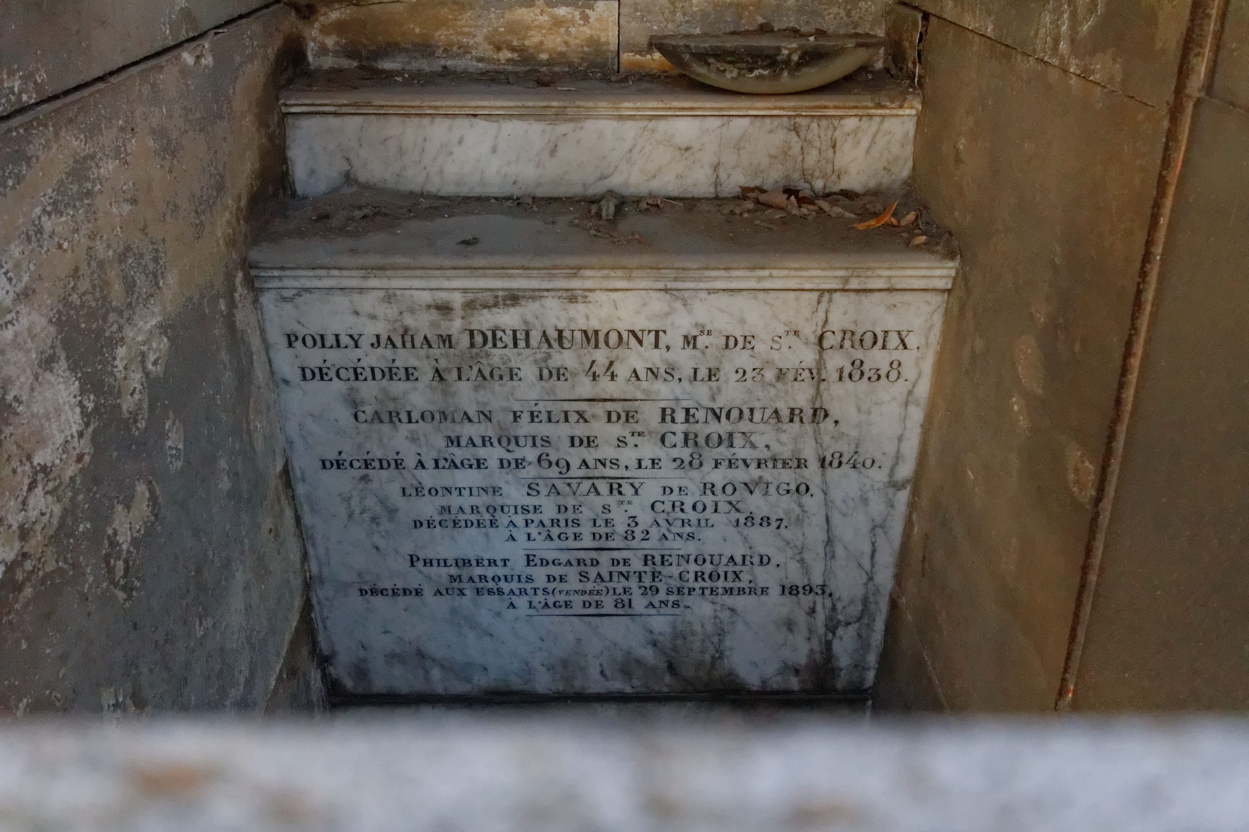 Chapelle